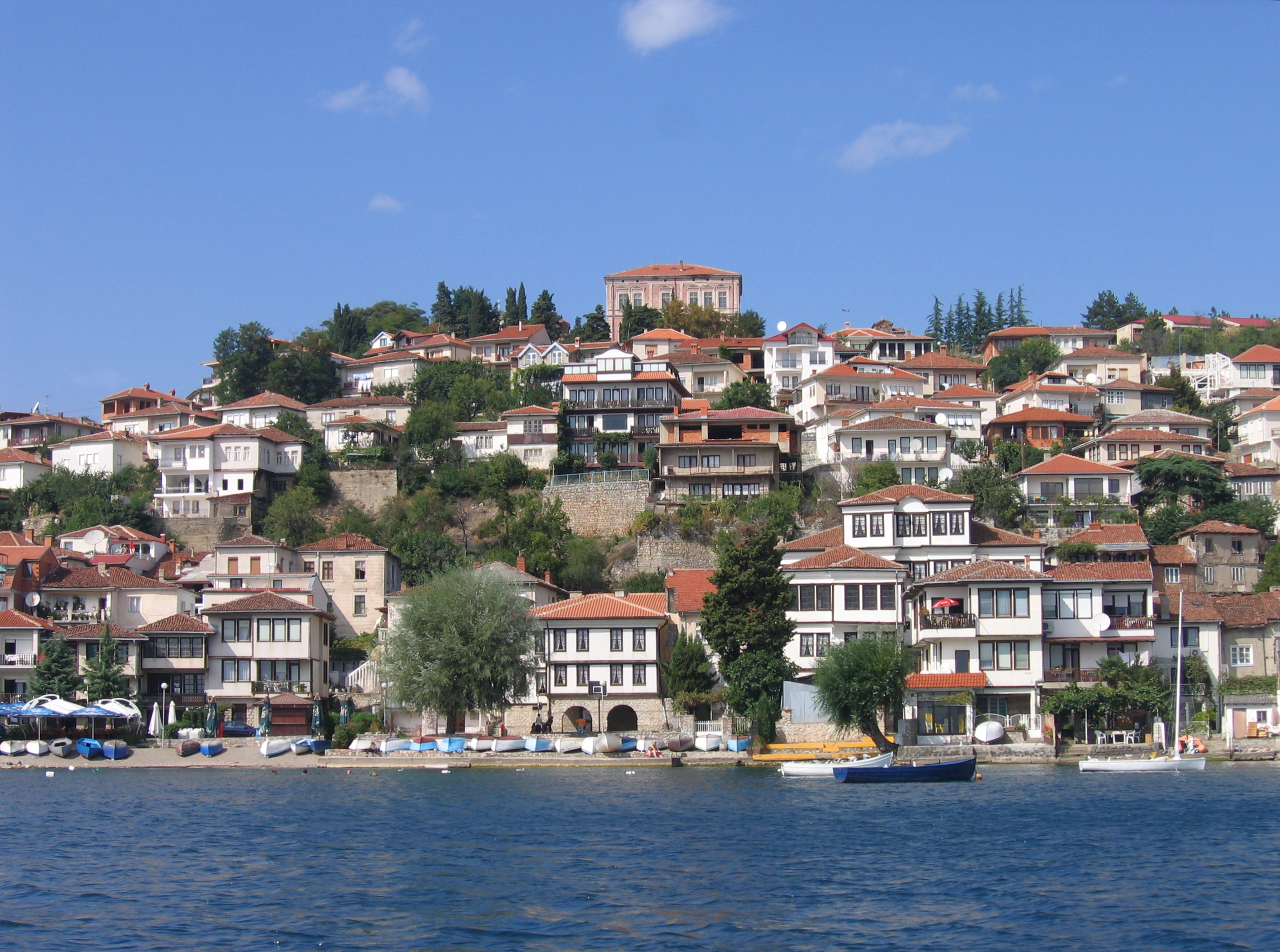 Охрид_2005_2942